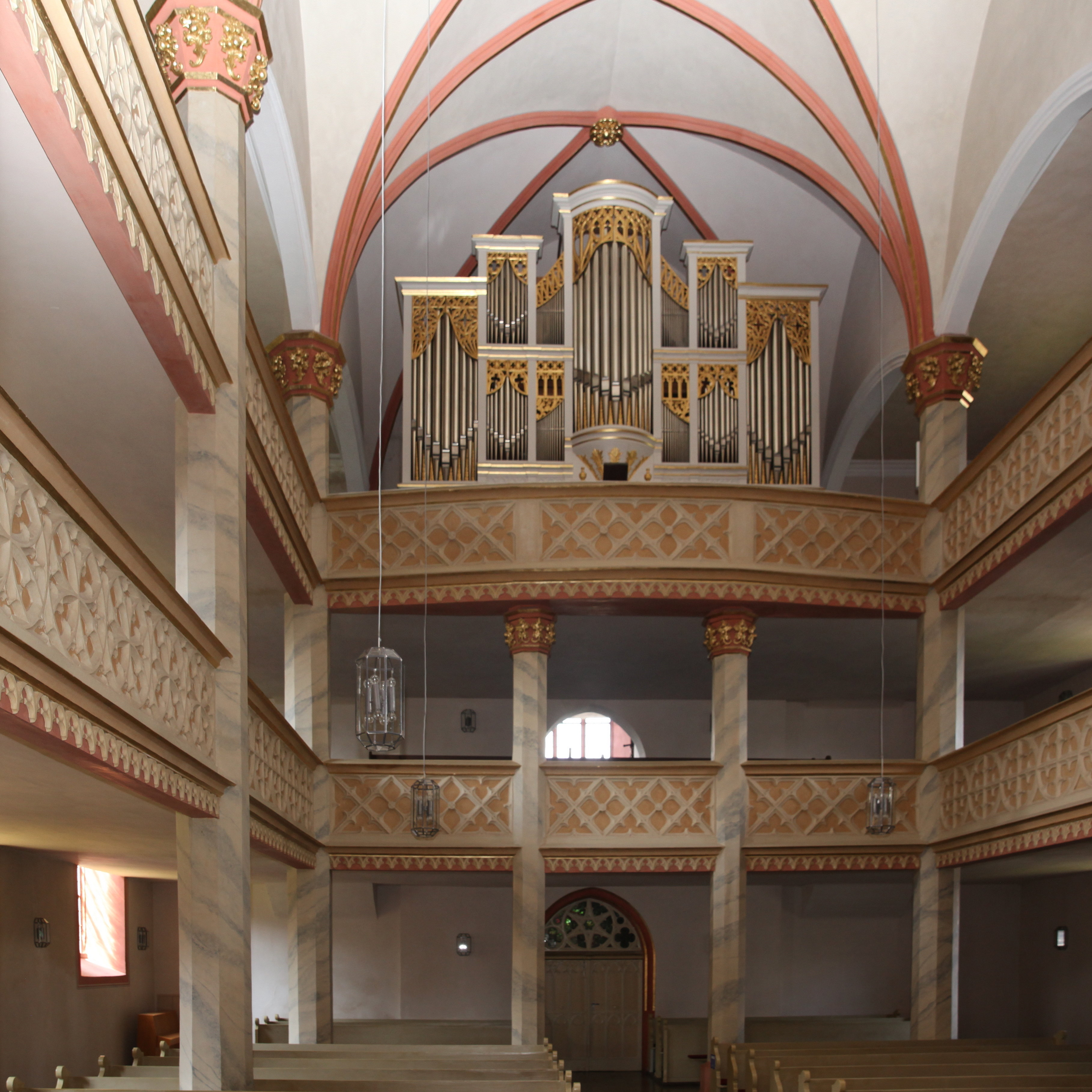 Innenraum, Evangelische Stadtkirche St. Georg in Neustadt bei Coburg